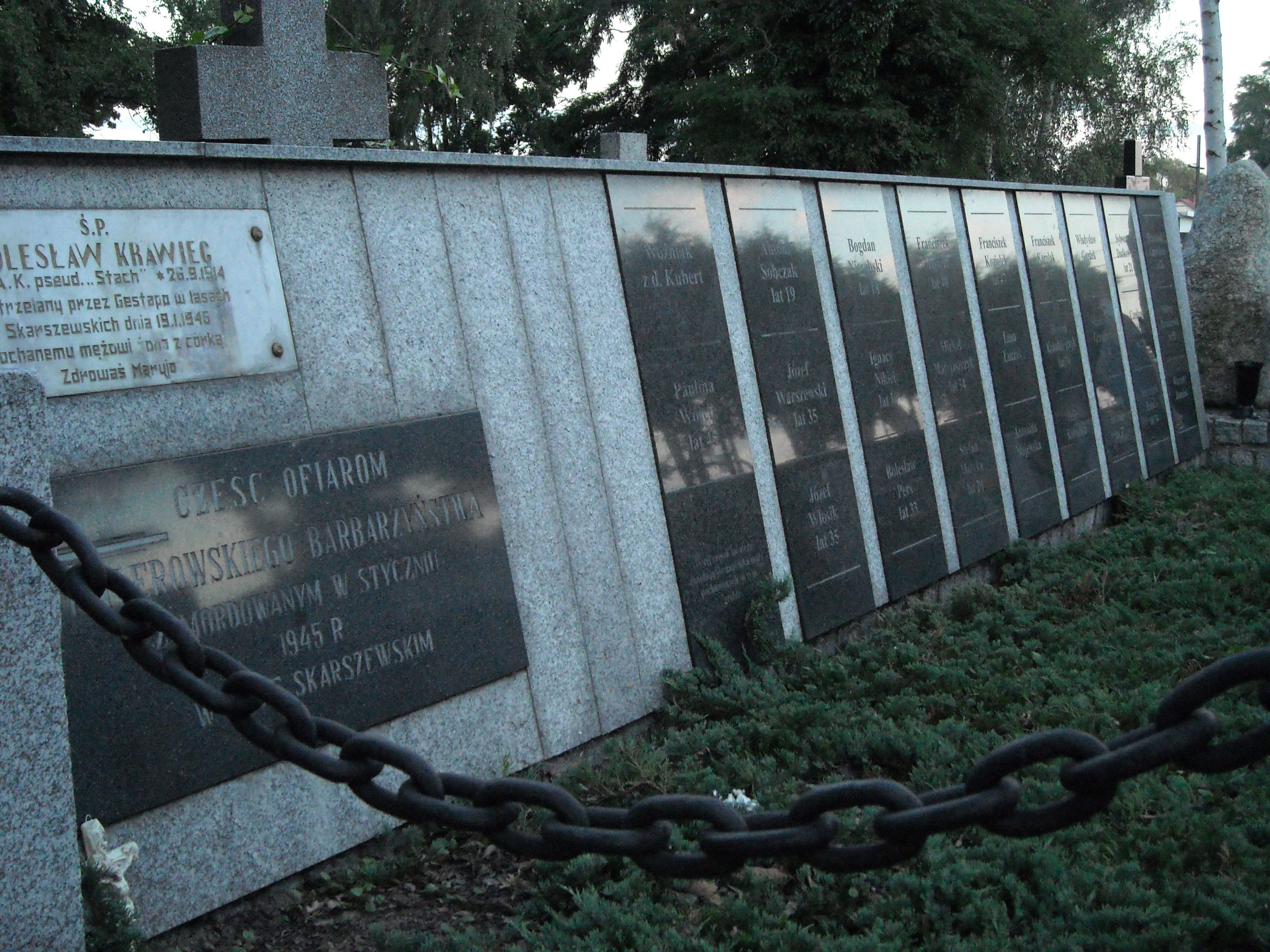 Kwatera żołnierzy AK na cmentarzu Tynieckim w Kaliszu zamordowanych przez Niemców w 1945 w Lasie Skarszewskim.